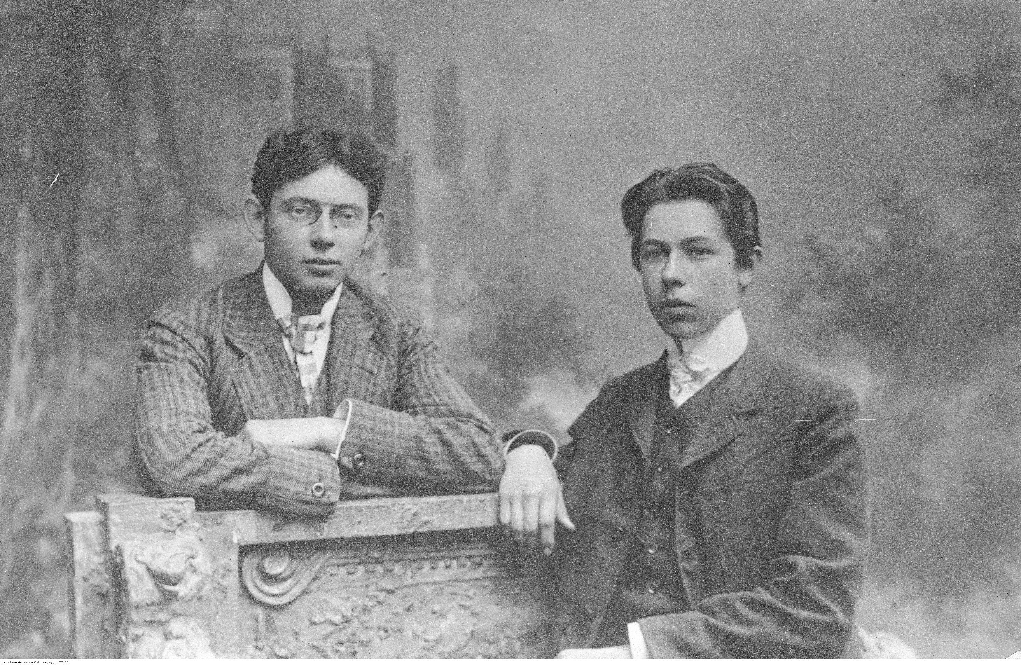 Tadeusz Hołówko ps. Kirgiz (z lewej) i Adam Orwid.